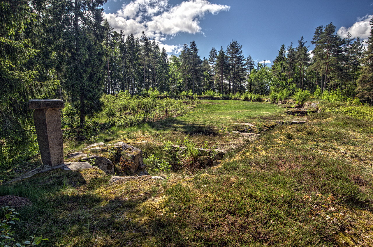 Gylleråsbatteriet i Råde